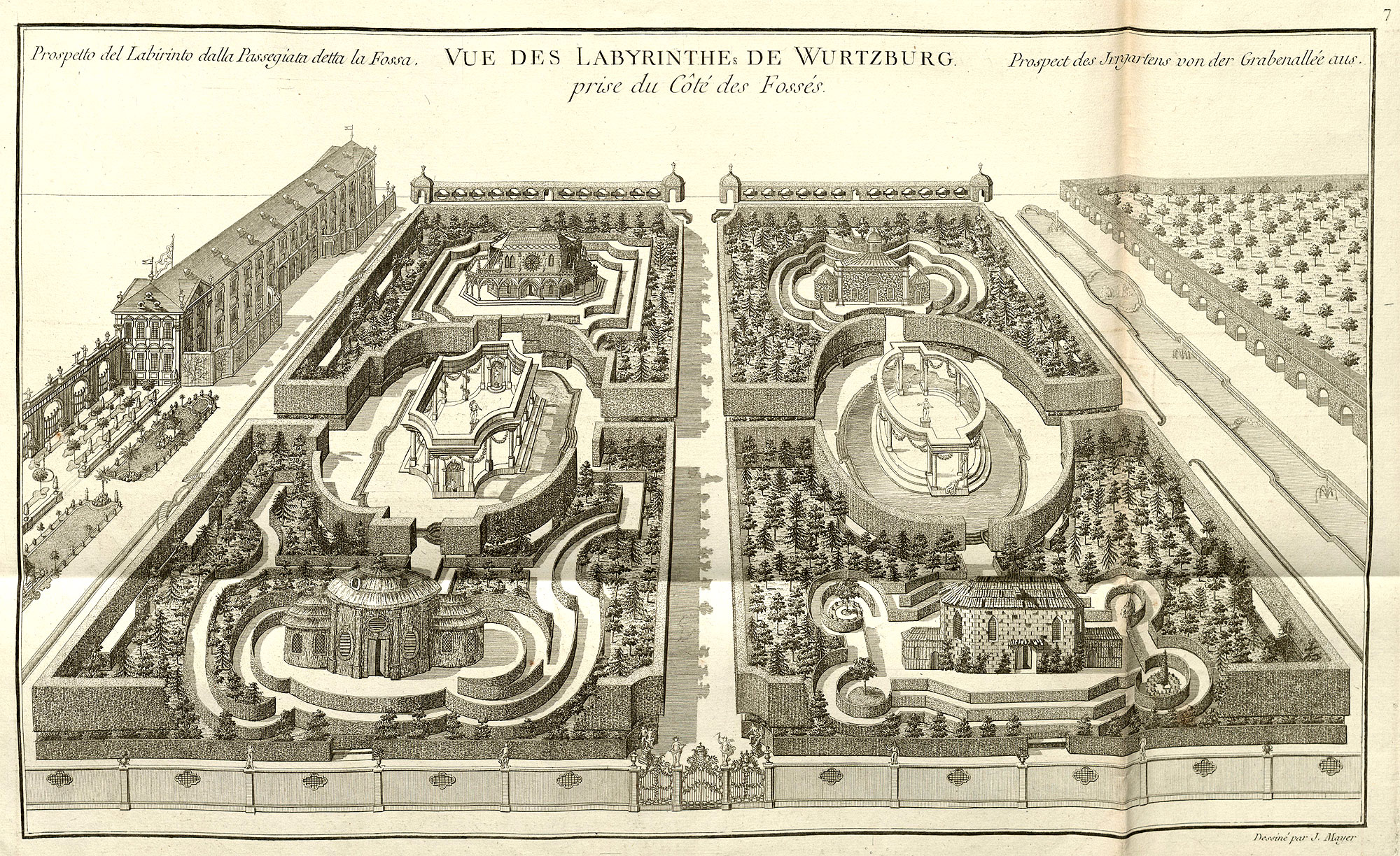 Kupferstich aus: Jardins anglo-chinois à la mode: Labyrinth im Hofgarten der Würzburger Residenz